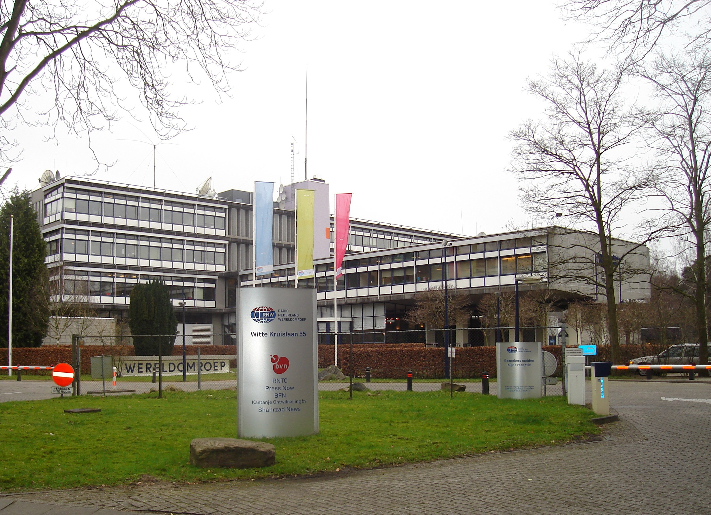 Radio Nederland WereldOmroep Gebouw مبنى إذاعة هولندا العالمية